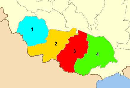 Χάρτης με τις ενότητες (πρώην δήμους) του Δήμου Βισαλτίας. 1 - Βισαλτίας 2 - Νιγρίτας 3 - Αχινού 4- Τραγίλου